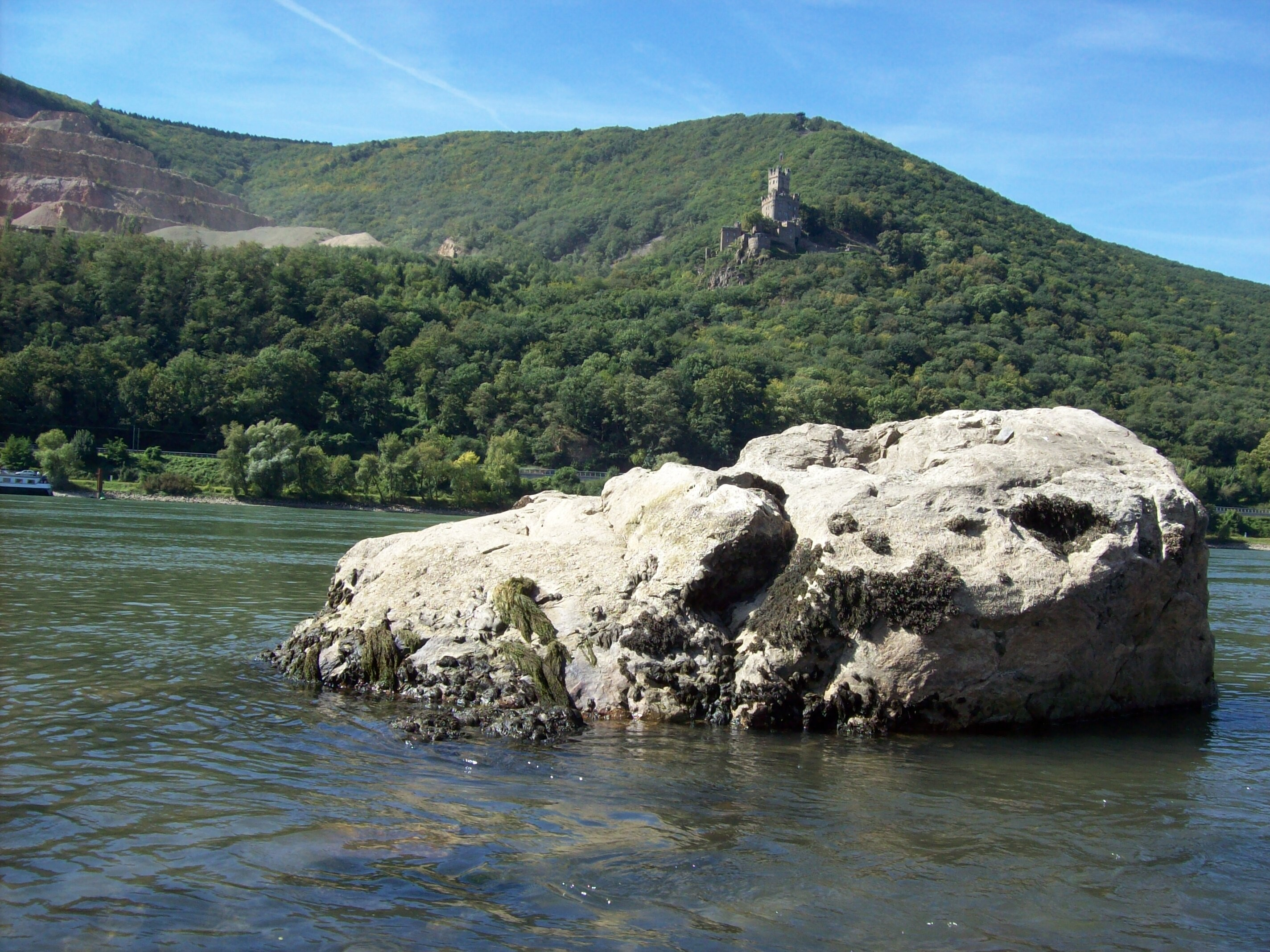 Großer Wacken, Untiefe des Rheins